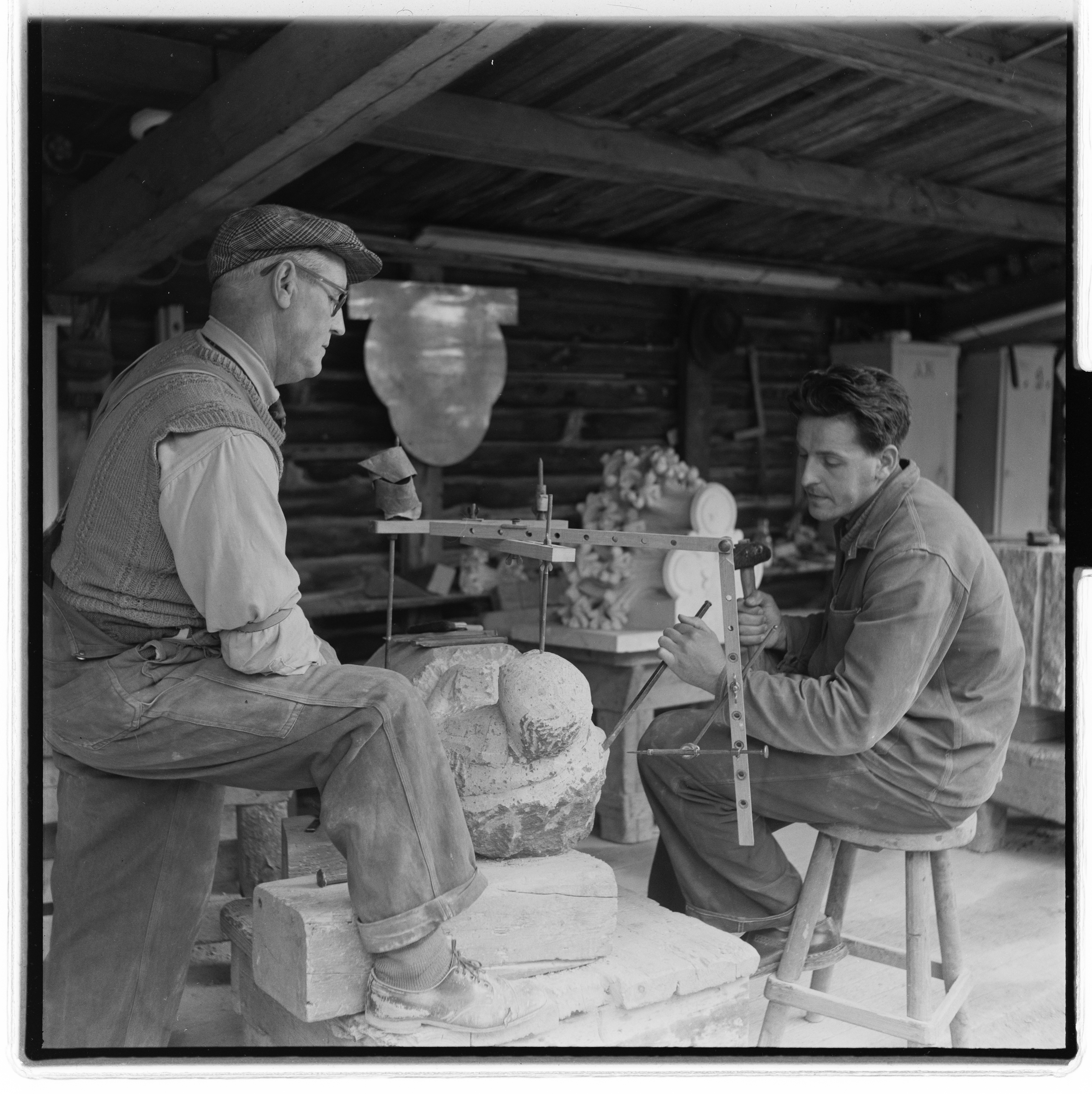 Bildet er hentet fra Arkivverket. Nidarosdomen, stenhuggere Arkivinstitusjon : Riksarkivet Arkivnavn : Billedbladet NÅ Sted : Norge, Sør-Trøndelag, Trondheim, Nidarosdomen Emneord: Nidaros Domkirkes Restaureringsarbeider, Steinhuggere Avbildet